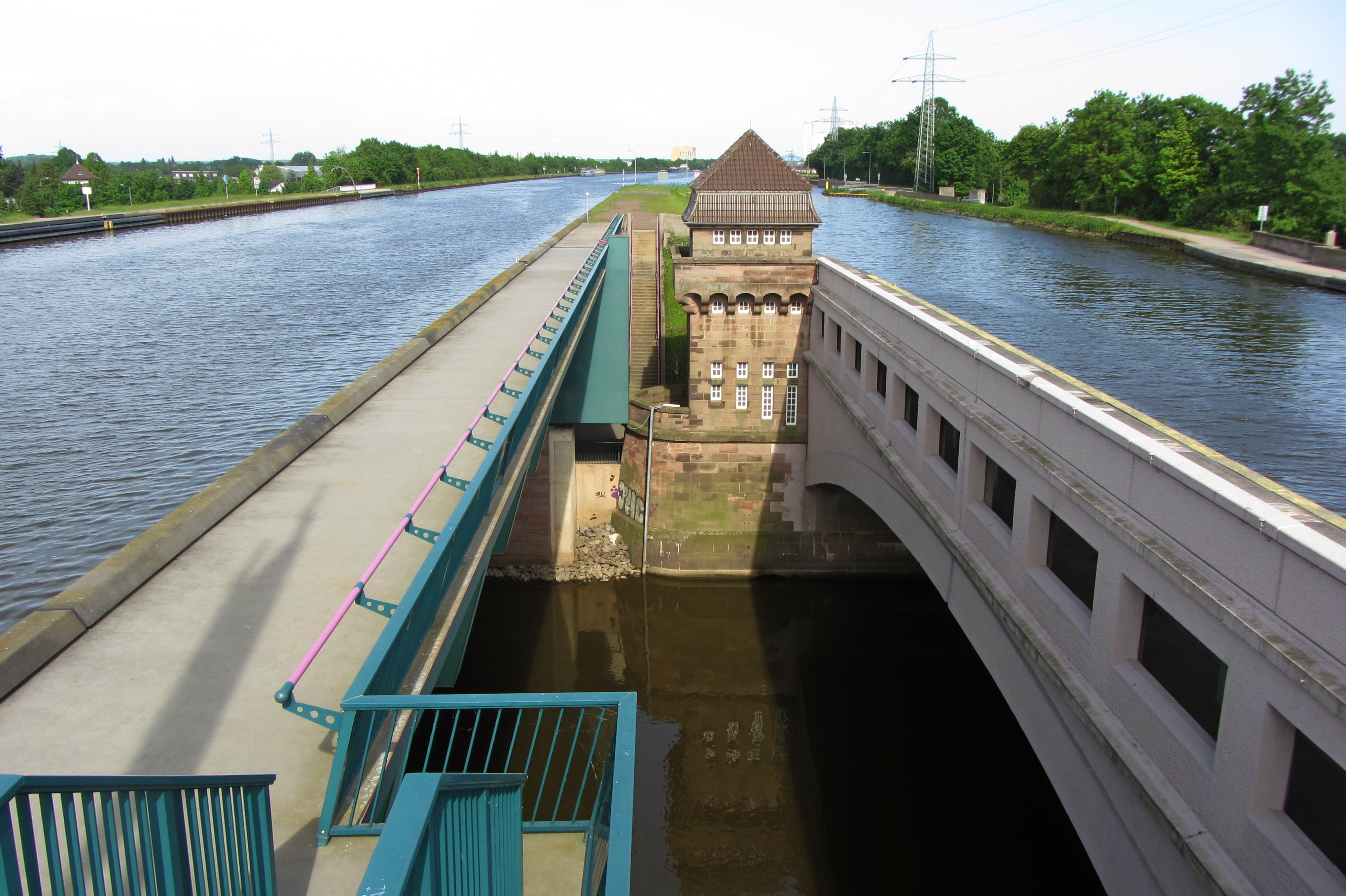 Minden Wasserstraßenkreuz. Blick zur Weser zwischen neuer und alter Kanalbrücke.